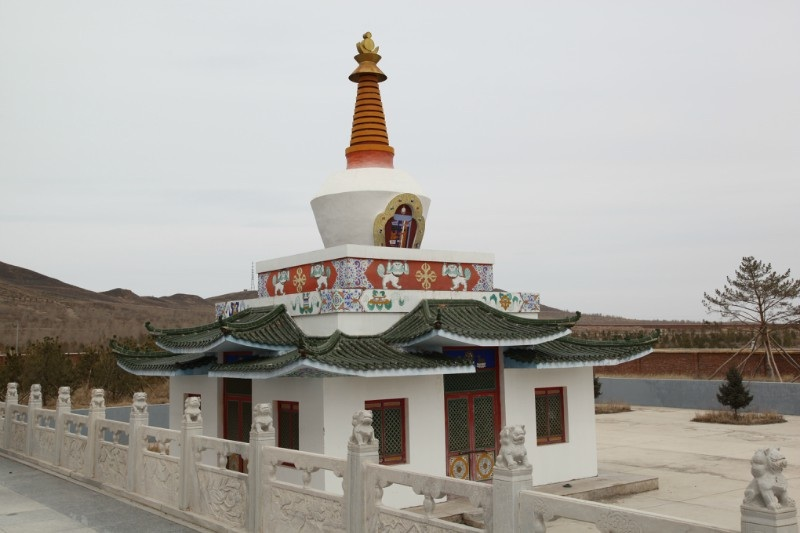 中文（中国大陆）: 吉林白城葛根庙2